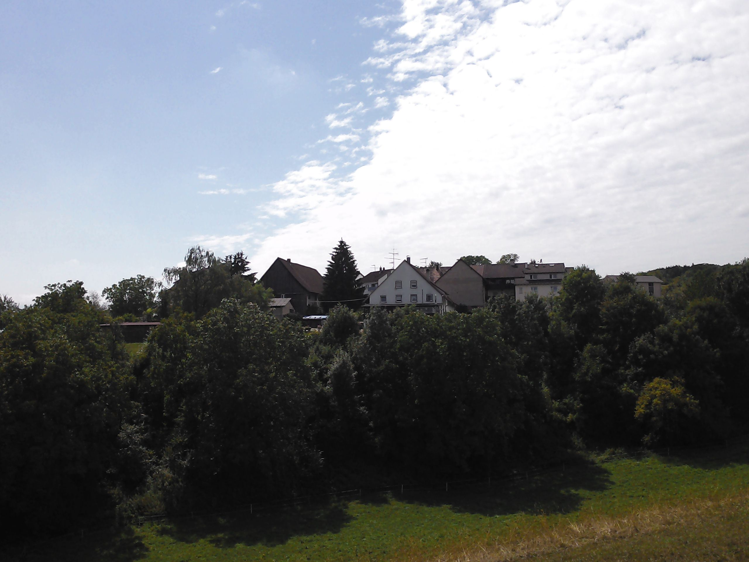 In der Gemeinde Wutöschingen, Landkreis Waldshut in Baden-Württemberg befinden sich "Die Höfe", heute zur Ortschaft Horheim gehörend, die ehemals eigenständig den Ort Lüttisloh bildeten.